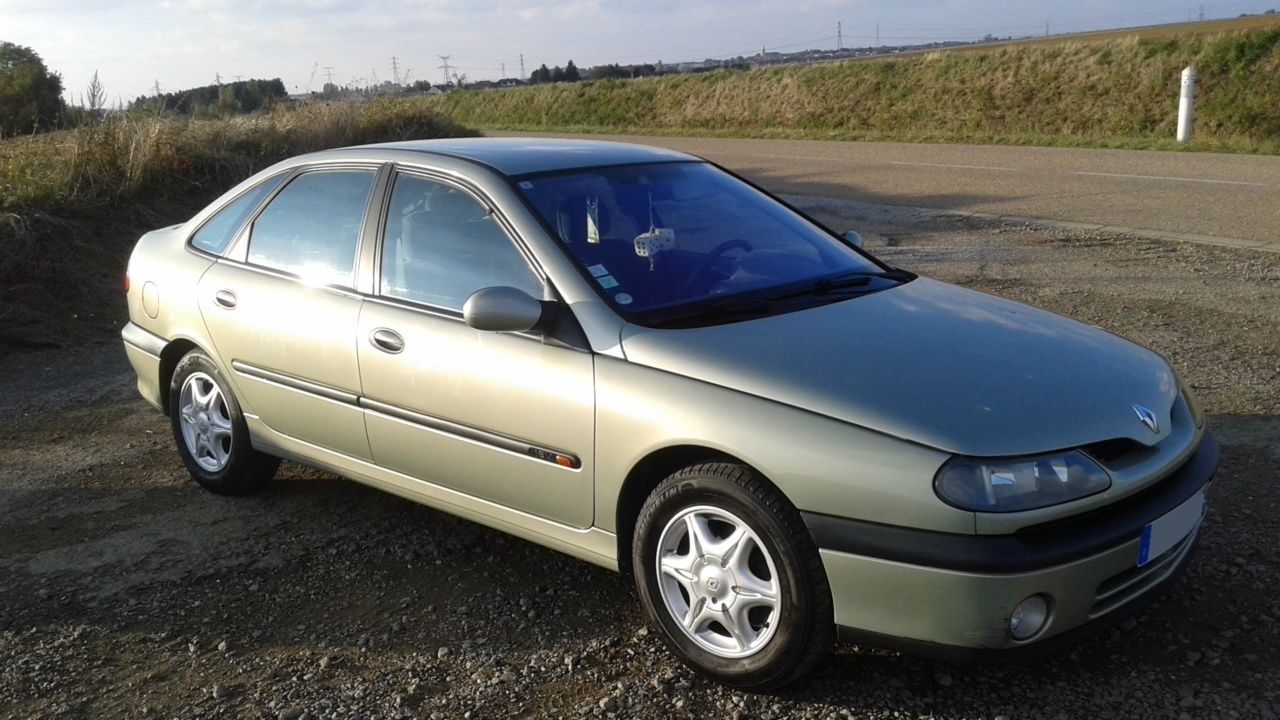 Renault Laguna I phase 2 Pack 1.6 16V